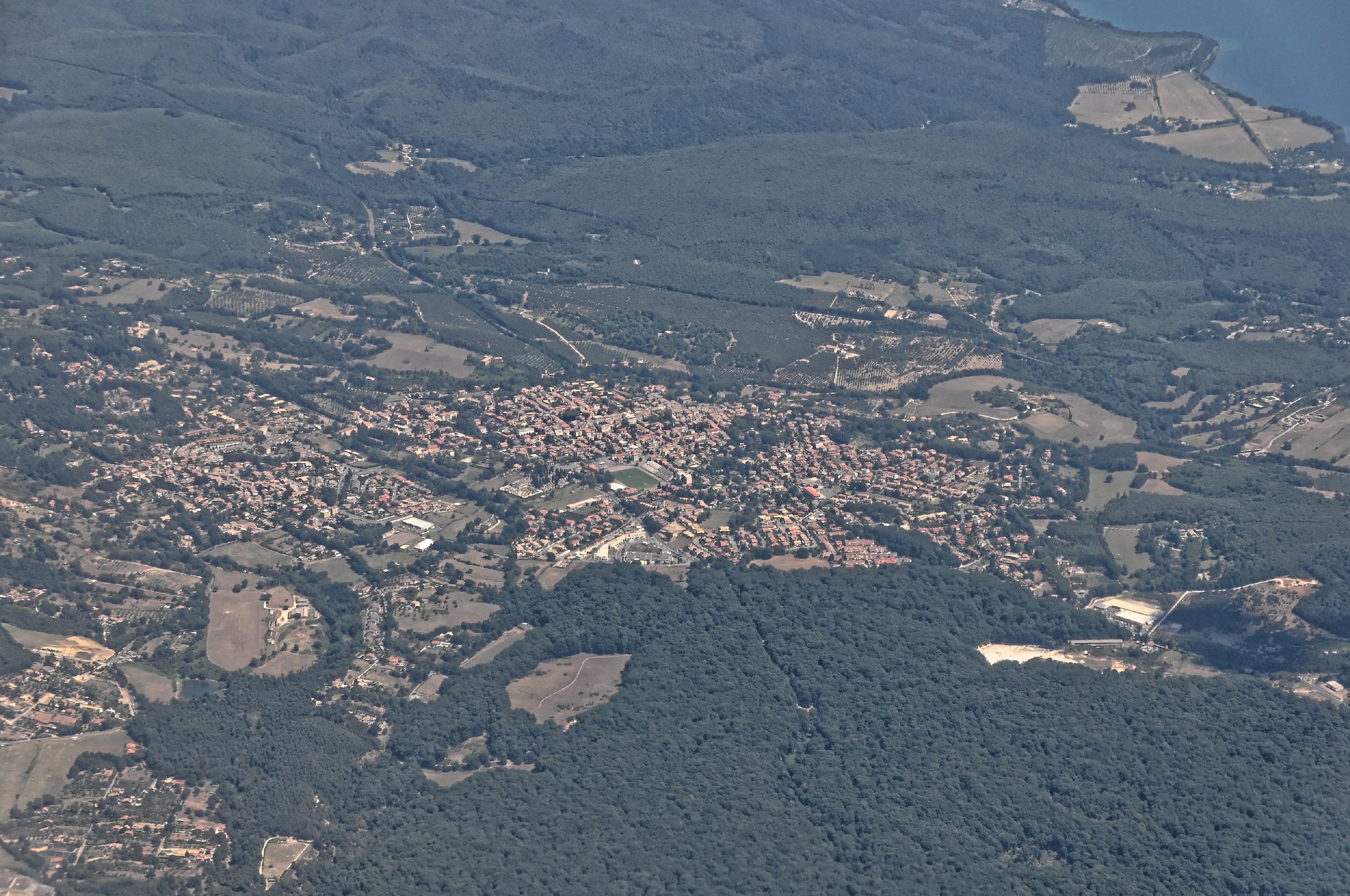 Bilder vom Flug -Rom-Düsseldorf-Hamburg 2013 Dieses Foto entstand in Zusammenarbeit mit Stadtbesichtigungen.de Die Seiten Stadtbesichtigungen.de, der dazugehörige Reise Blog sowie die Facebookseite: Stadtbesichtigungen Rom dürfen dieses Bild für Ihre Veröffentlichungen ohne den Hinweis auf Wikipedia, Commons bzw der Lizenz verwenden. Die Verantwortlichen habe von mir (Ra Boe) die Originaldaten zur freien Verfügung übermittelt bekommen.